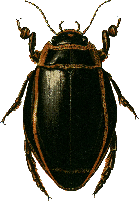 This file has been extracted from another file: Jacobs11.jpg